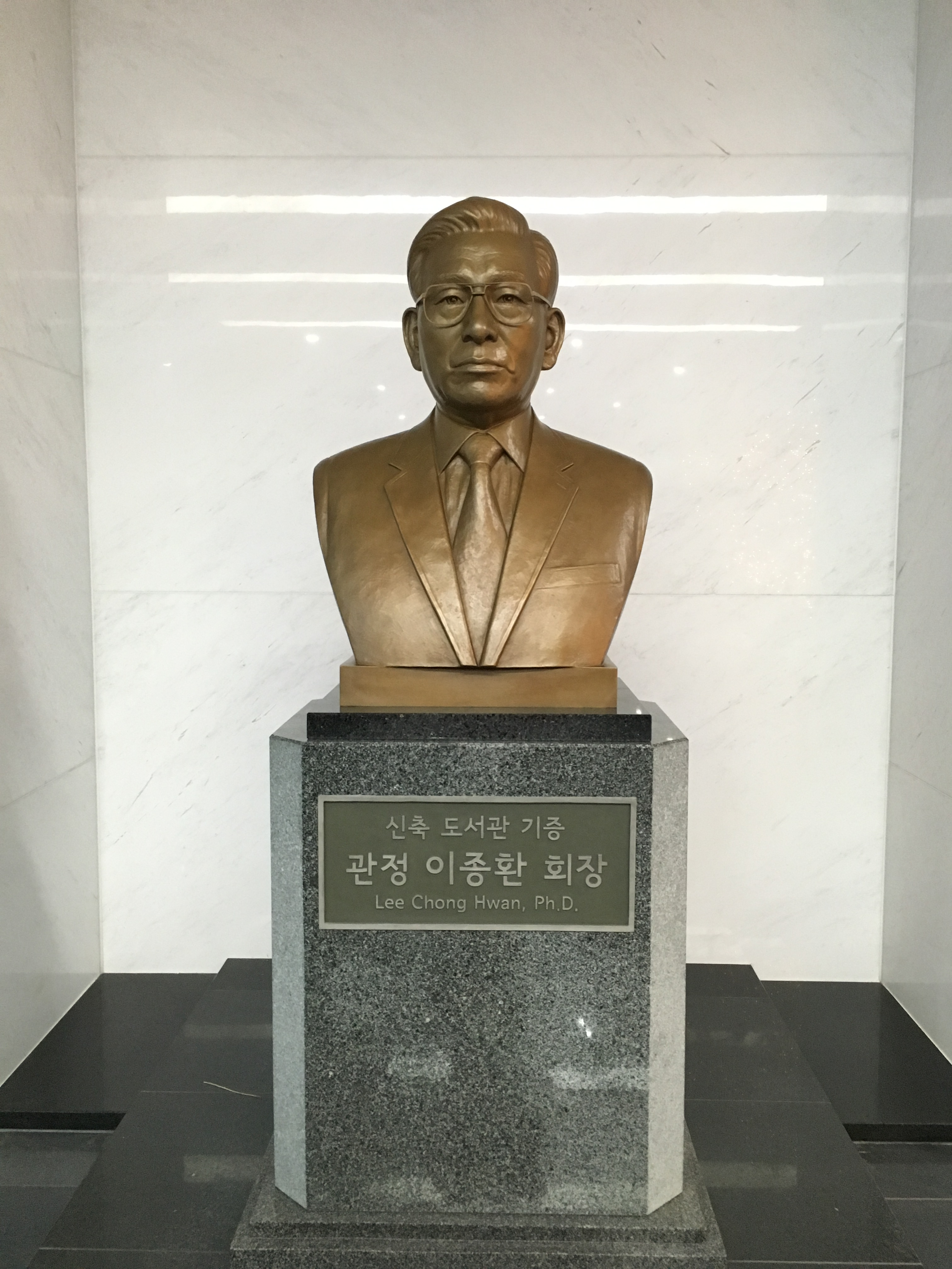 관정도서관 1층 내부